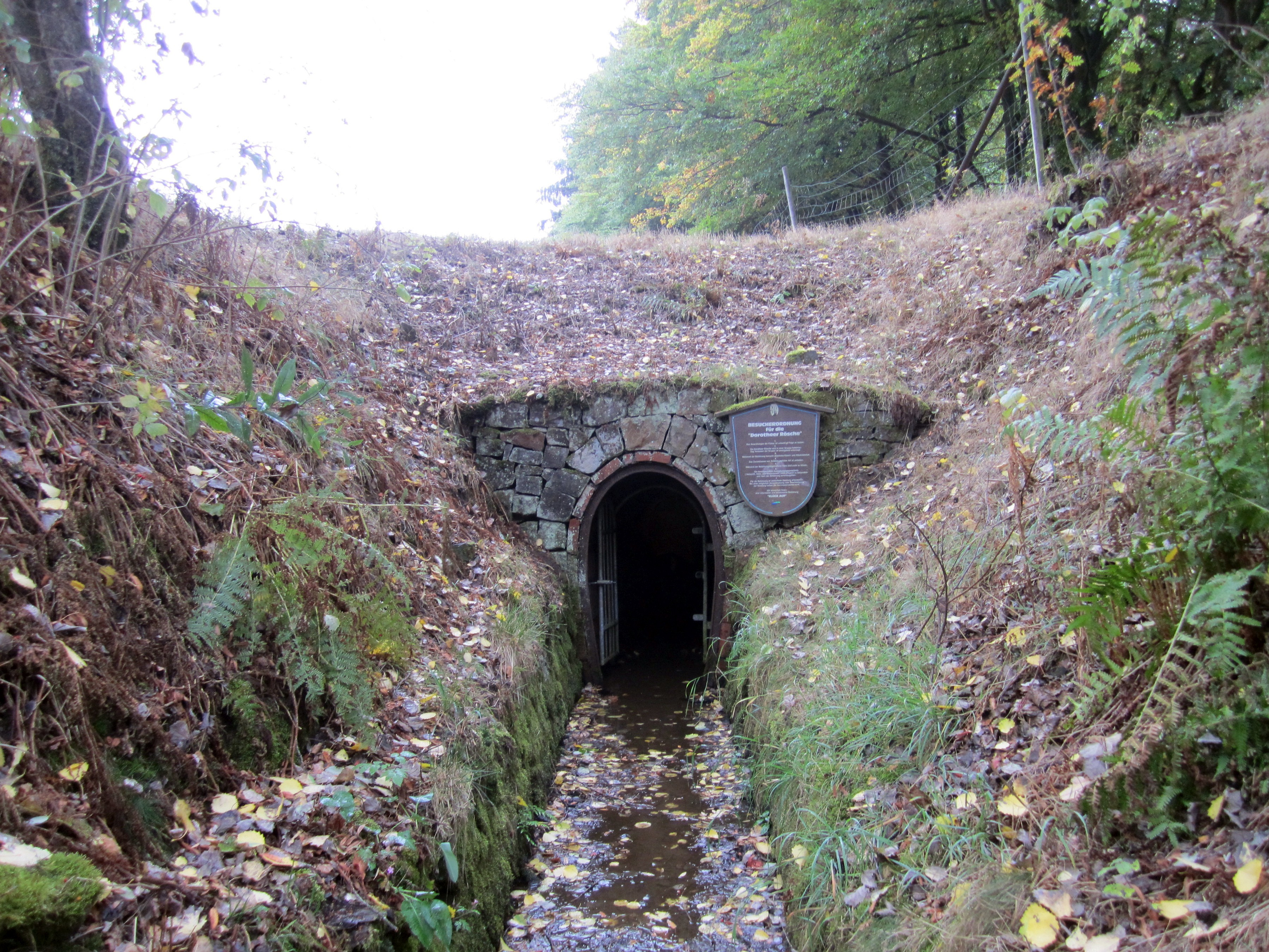 Mundloch der "Dorotheer Rösche", der Abzugsrösche des Kehrrades der Grube Dorothee. Clausthal, Clausthal, Gemeinde Clausthal-Zellerfeld, Niedersachsen, Deutschland.